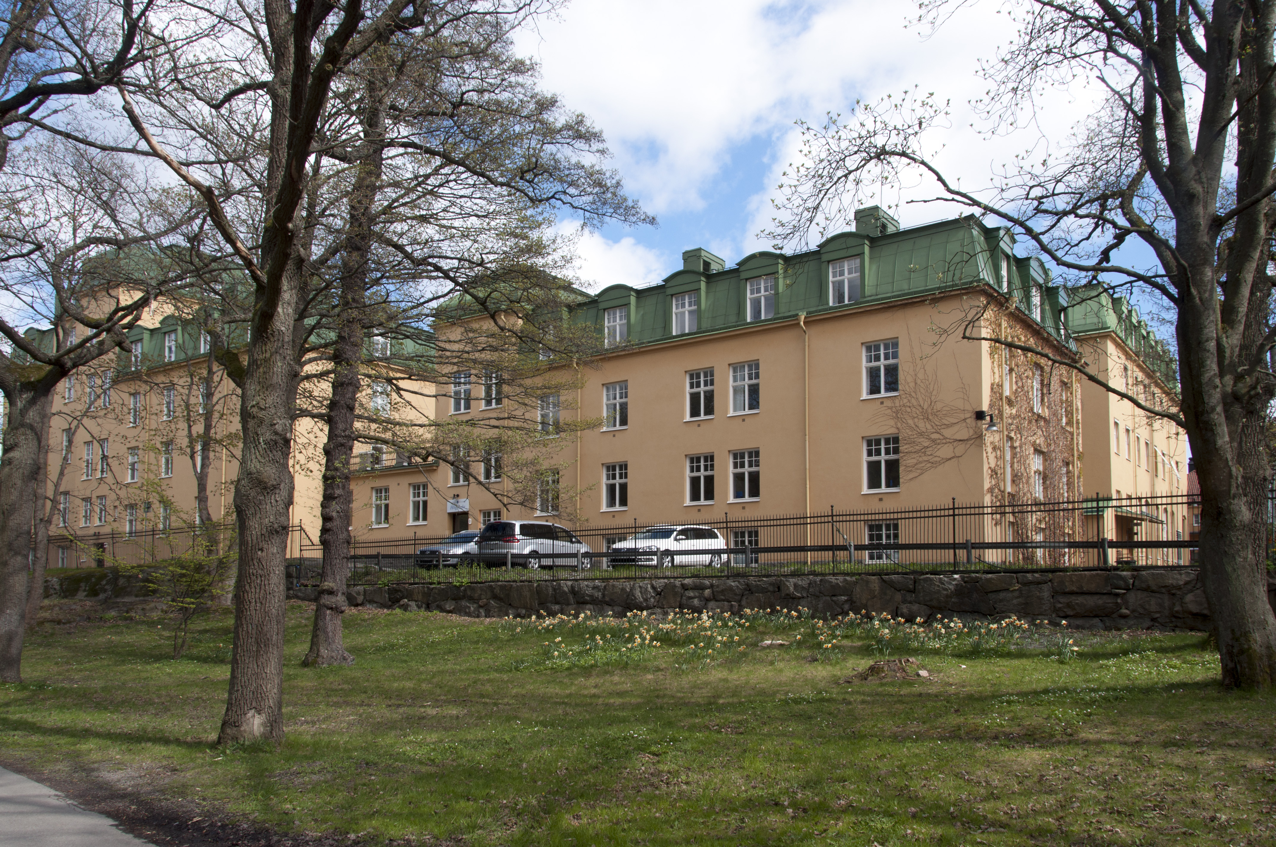 Lill-Janshuset, ursprungligen Allmänna barnbördshuset invigt 1913. arkitekt Gustaf Wickman